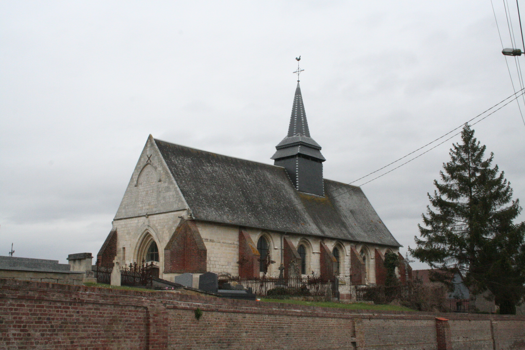 Picard: église éd Cotinchy, Sonme, Picardie